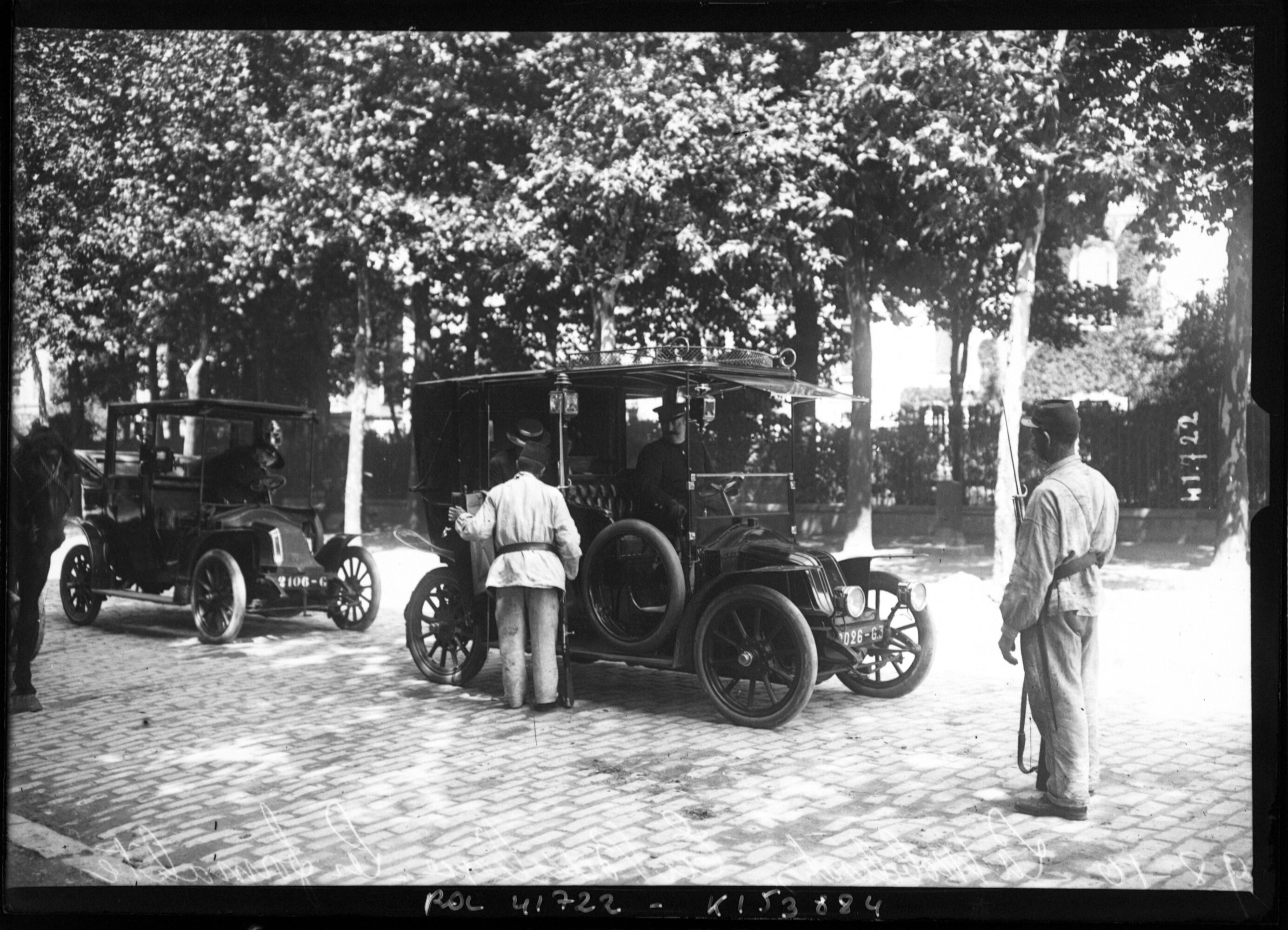 Contrôle d'identité des voyageurs, banlieue parisienne, 9 août 1914